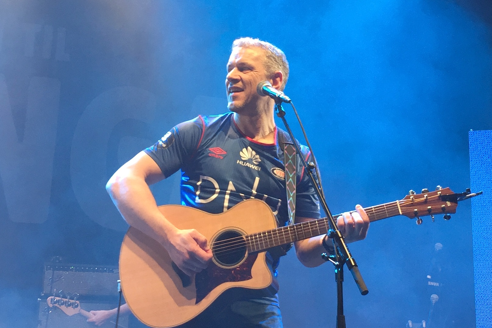 Kjell Roar Kaasa, tidligere fotballspiller.